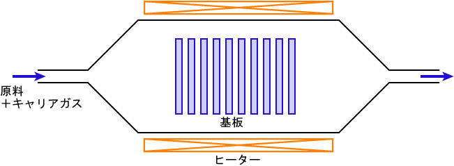 熱CVD装置（ホットウォール型、バッチ式）の構成図 参考：図解・薄膜技術、真下正夫、畑朋延、小島勇夫、培風館、1999年、ISBN 4-563-03541-6